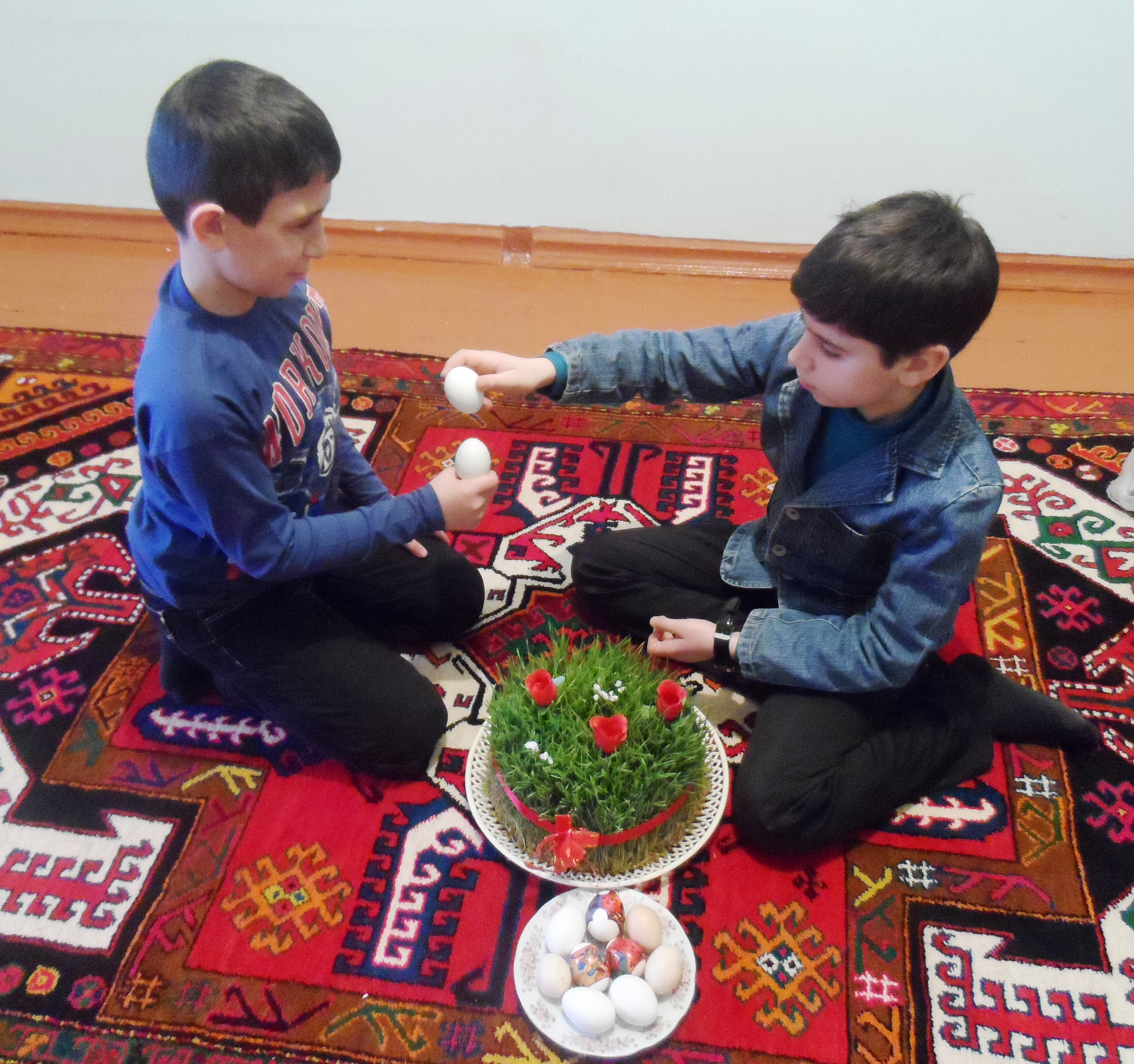 Yumurta döyüşdürmə - Azərbaycanda ən çox yazqabağı (Novruz bayramı) günlərdə əsasən uşaq və gənclər arasında, geniş şəkildə oynanılan qədim Novruz oyunlarından biridir.